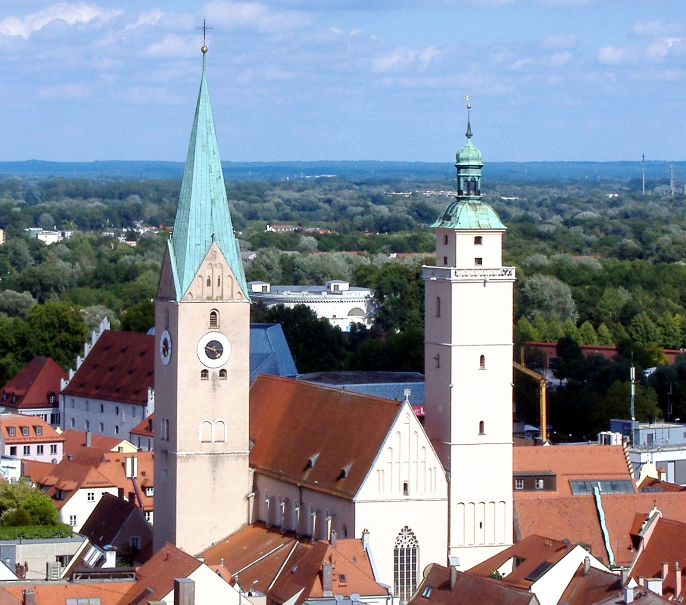 Die Moritzkirche in Ingolstadt. Vom Südturm des Münsters aus gesehen.